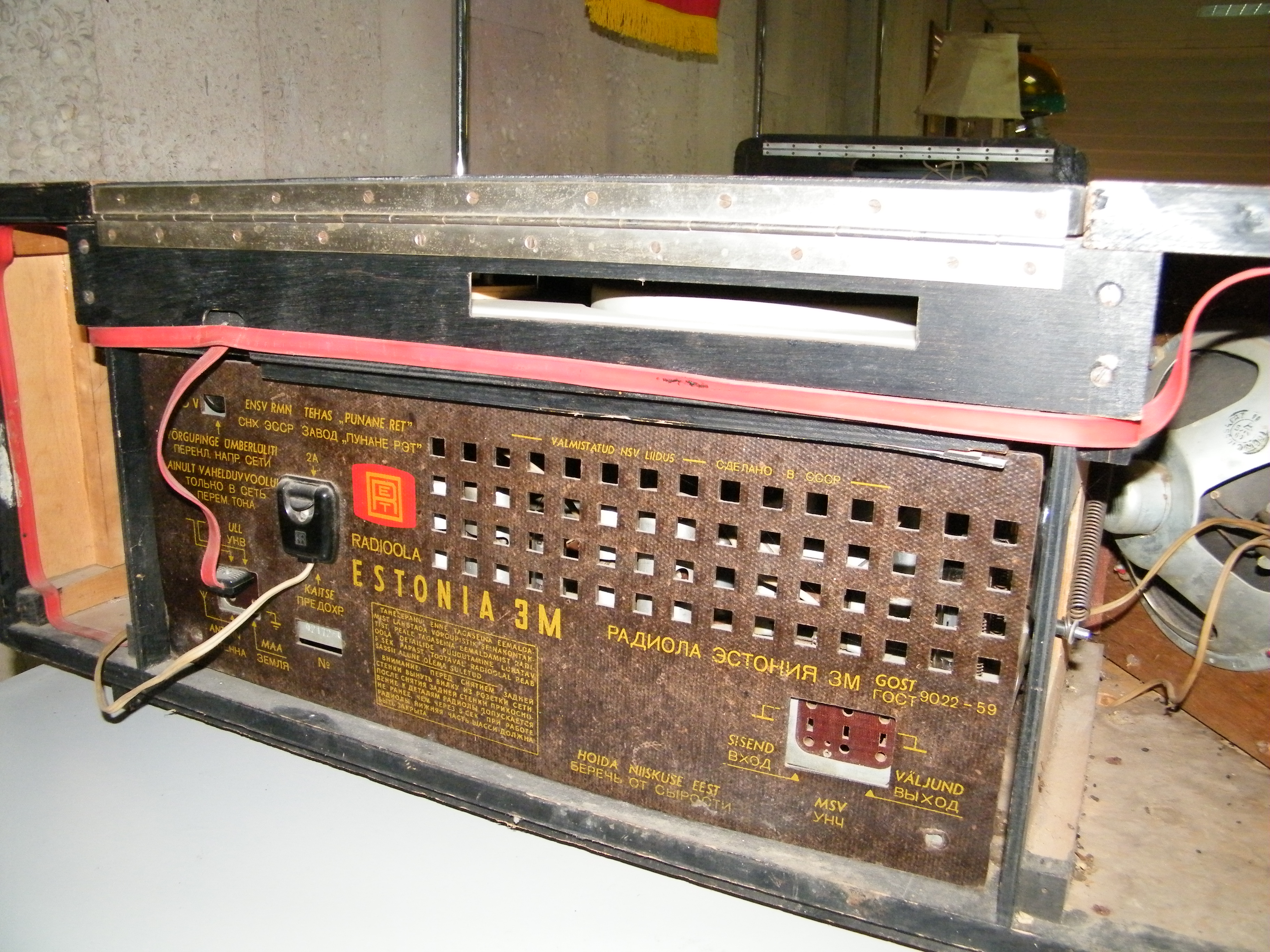 Теплый ламповый звук